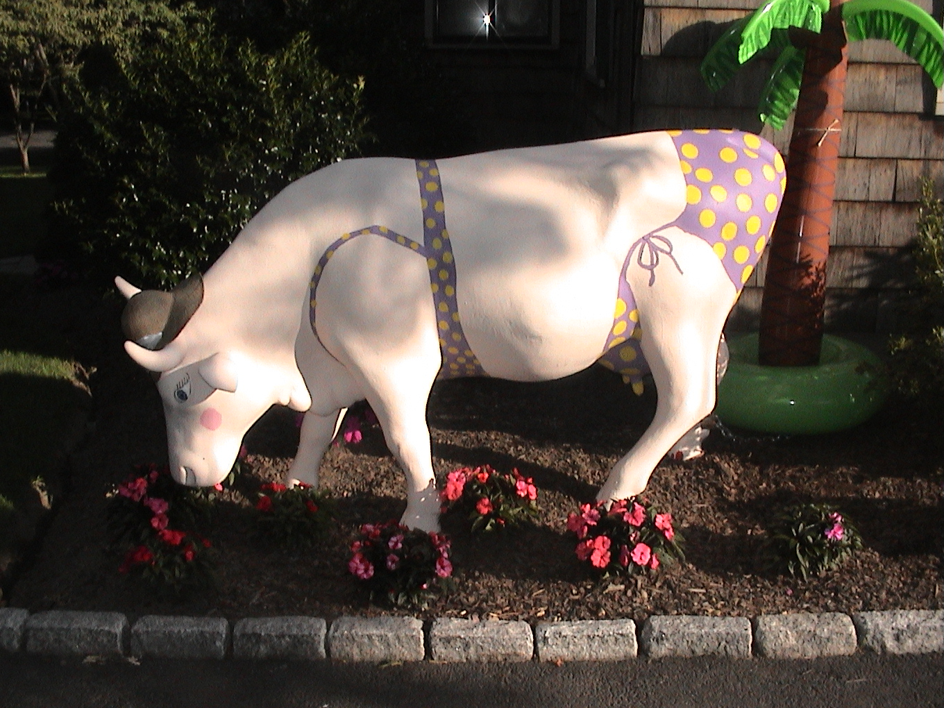 Gladys in a Bikini